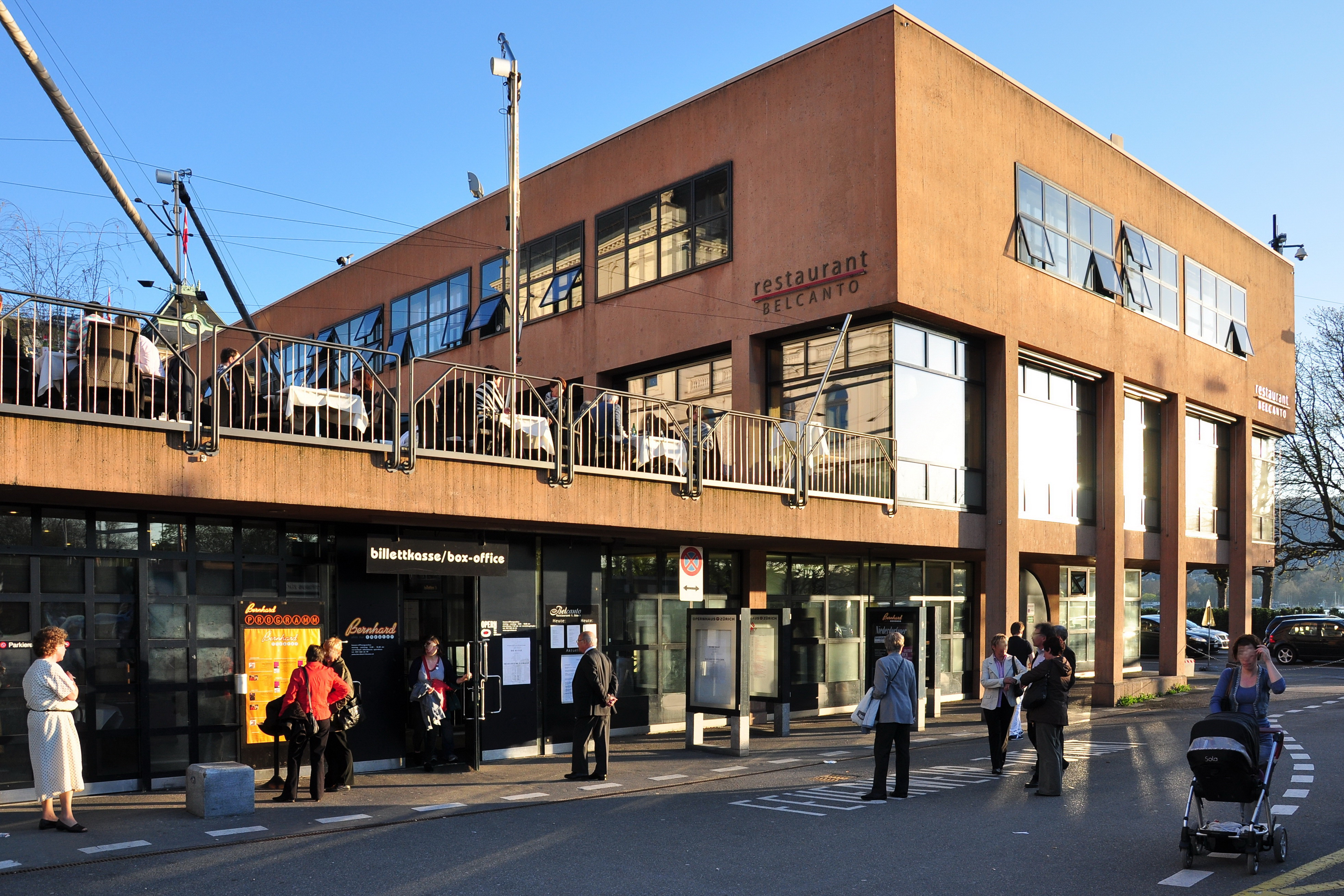 Bernhard-Theater in Zürich (Switzerland)